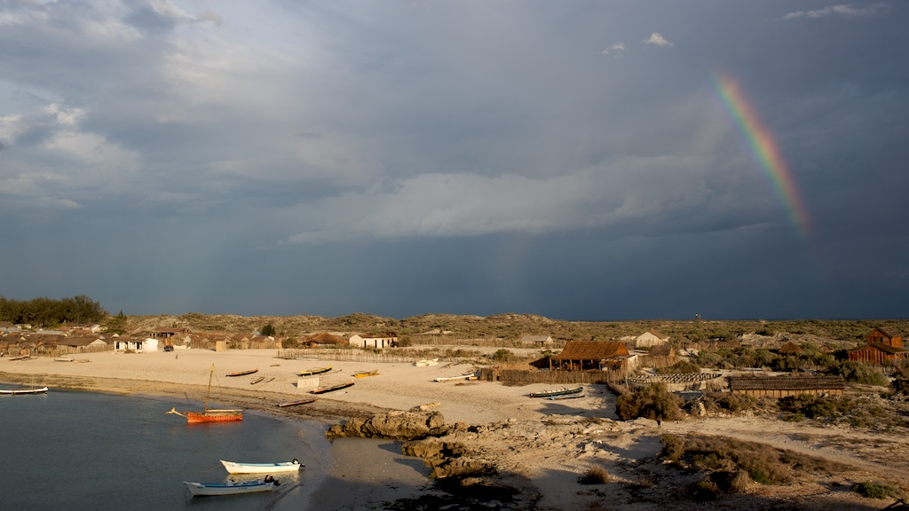 Andavadoaka